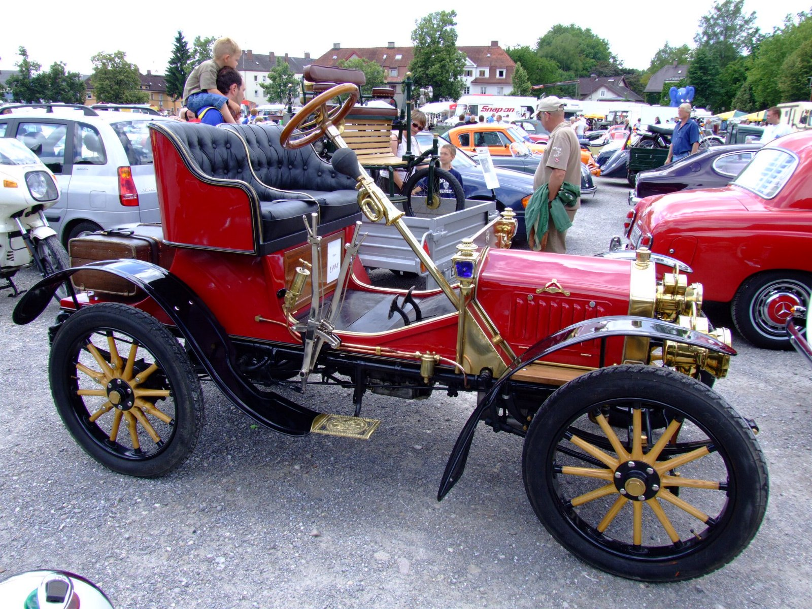 Quelle: selbst fotografiert, 07/2006 Fotograf: Späth Chr.